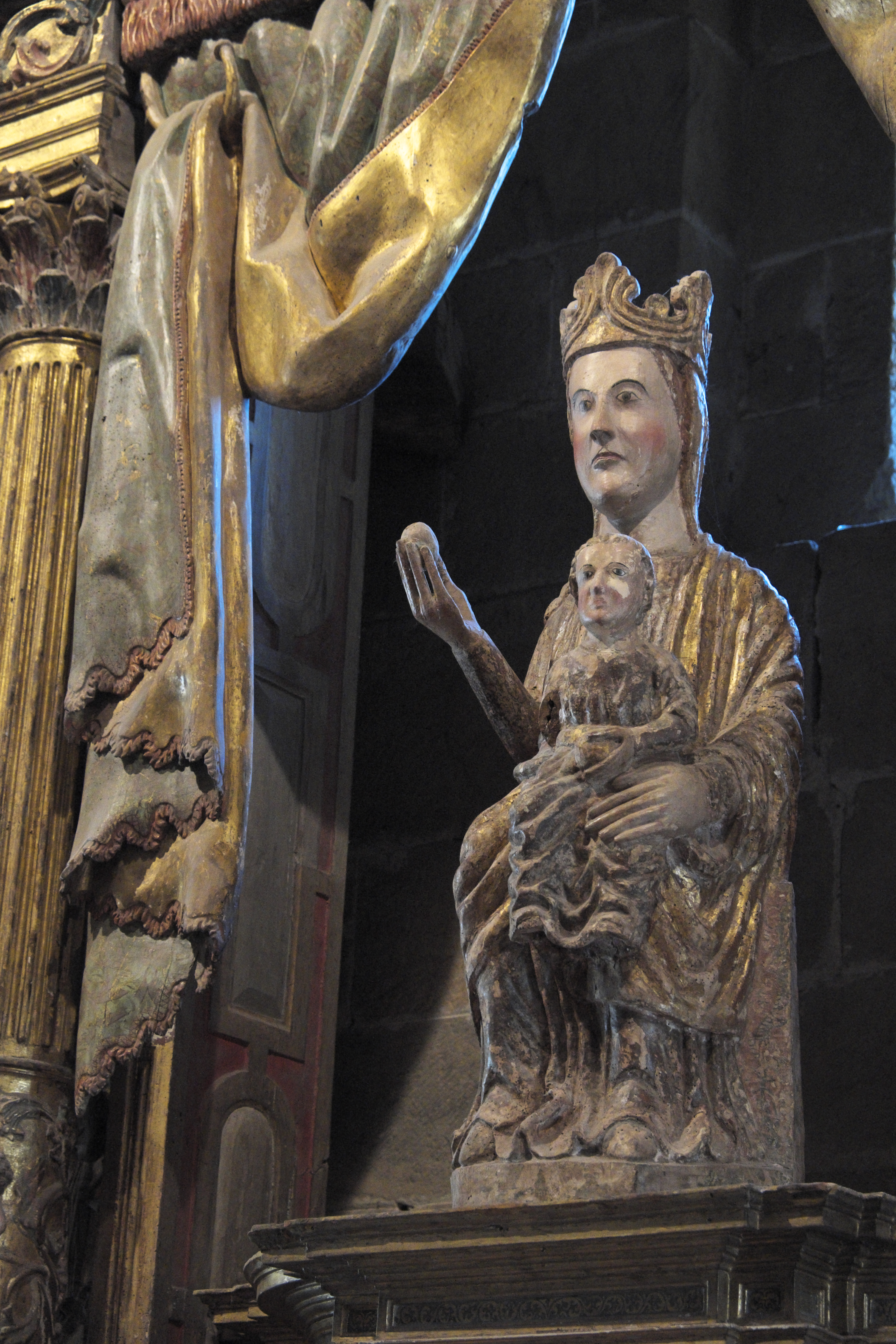 Ehemalige Benediktinerklosterkirche Colegiata de Santa Cruz in Castañeda in Kantabrien (Spanien), Madonna mit Kind